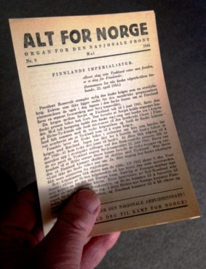 Alt for Norge nr 9 1944, illegal avis